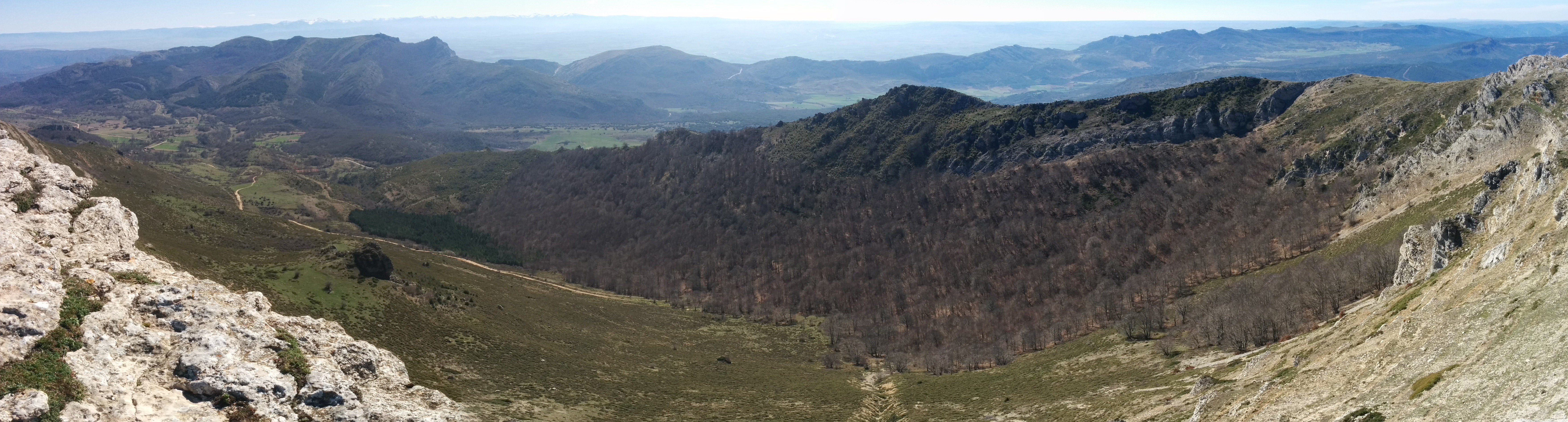 Ascenso sur al pico Humión (Partido de la Sierra en Tobalina, Burgos).